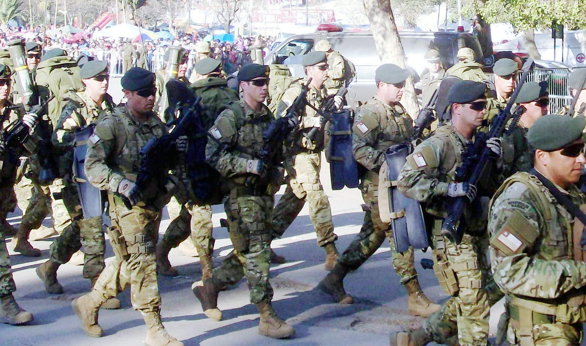 Soldados de INFANTERIA DE MARINA Y BUZOS TACTICOS DE LA ARMADA DE CHILE, en el desfile militar del Bicentenario. Septiembre 2010.